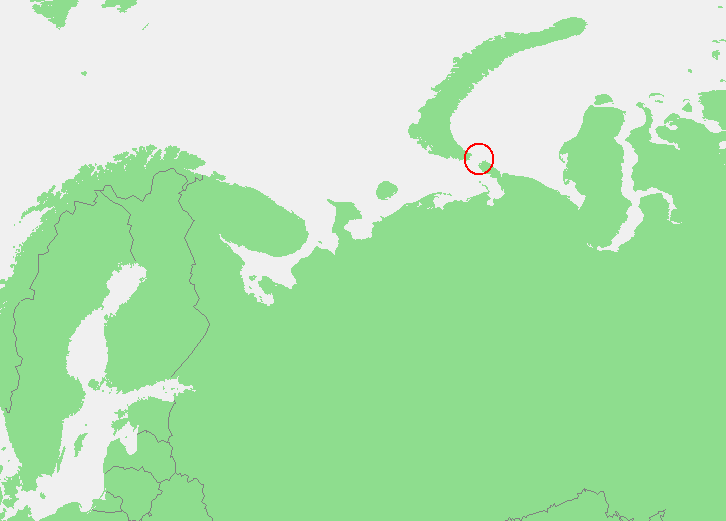 In dutch: Locatie Karische Poort / Kari Strait